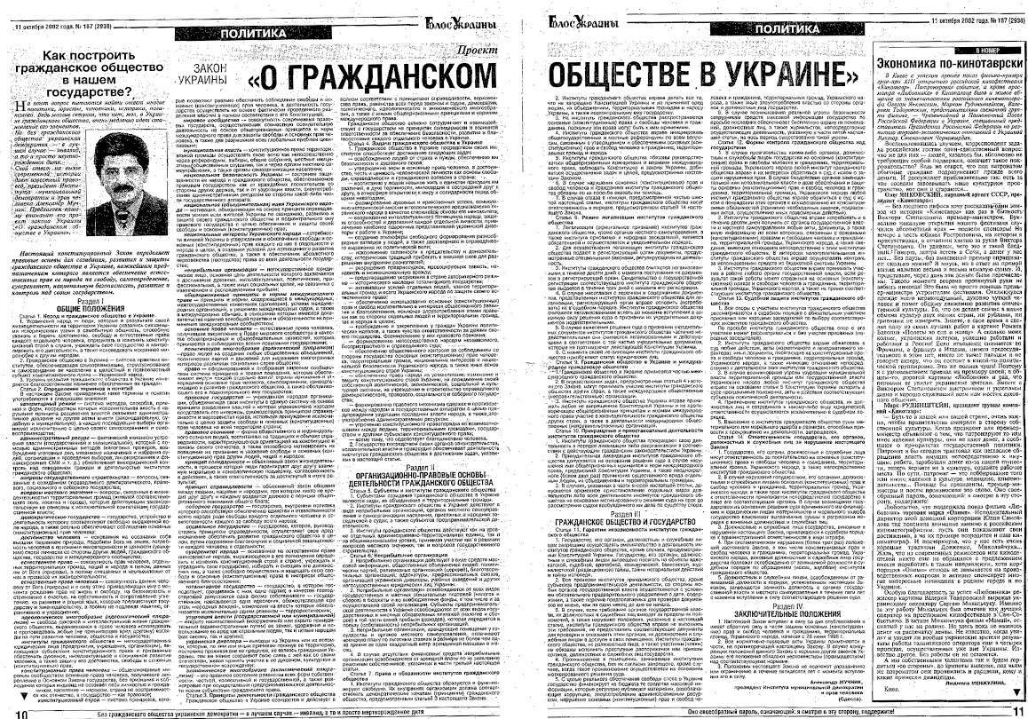 Закон Украины в газете «Голос Украины»